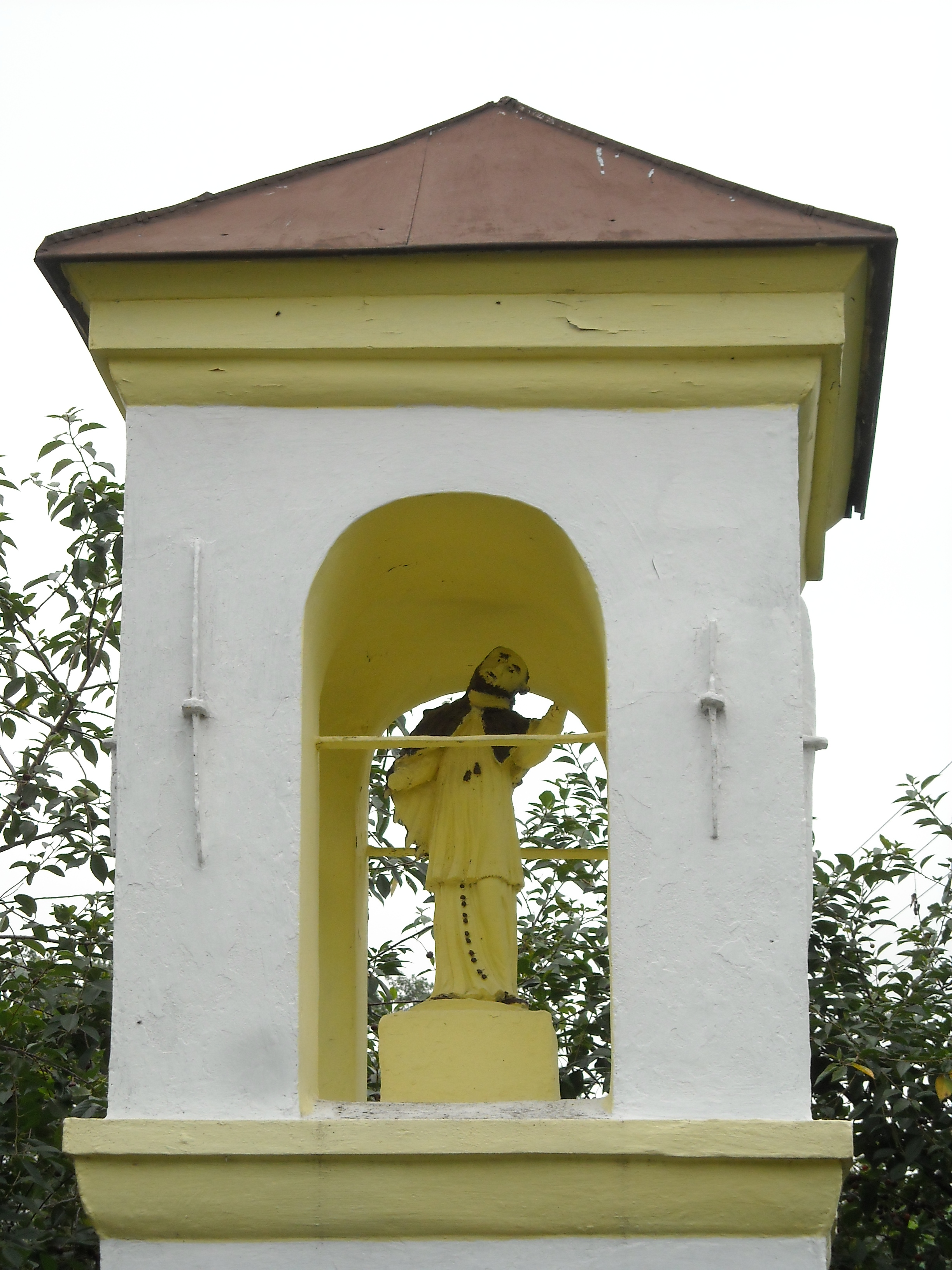 Figurka św. Jana Nepomucena w kapliczce w Rudzienku (powiat otwocki) pochodząca z 1 poł. XIX wieku.